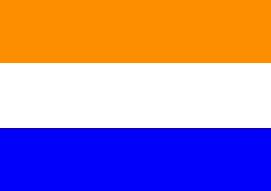 Es la bandera del Municipio de Dolores en Cabañas, El Salvador